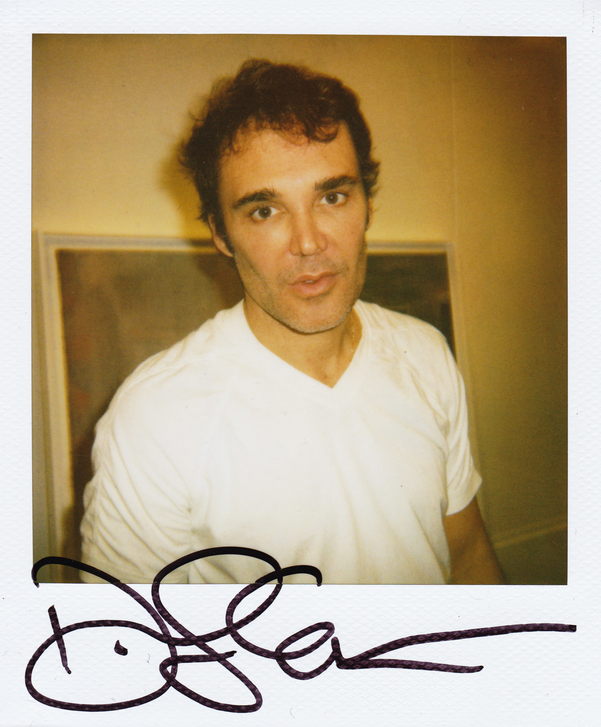 by Alexander Kargaltsev Мой хороший друг Дайв (так я ласково его называю) неистово боготворит мои работы и отчаянно зовет в Лос-Анжелес с ним сотрудничать (я пока не могу покинуть Нью-Йорк, но речь сейчас не об этом). Дайв любит мне часто рассказывать об Энди Уорхоле, например, был такой случай... Осенью 1986 года друзья Энди во главе с его агентом пошли пристраивать 4 уорхоловские работы в Музей Современного искусства (MoMa), музей отказал! Друзья решили не расстраивать гения, и не сказали ему о провале, тем более, что Metropolitan museum был очень в них заинтересован. Через пару месяцев так случилось, что Энди умер. И тогда MoMa увесил все свое здание от подвала до чердака его работами! Шапель ходил по залам музея и не втыкал: "Мы ведь действительно жили рядом с гением"... Друзья, цените живых, мертвым все равно.